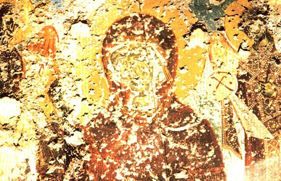 Скална фреска на Богородица край Дервешен